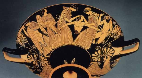 Raffigurazione di Penteo su un vaso greco.